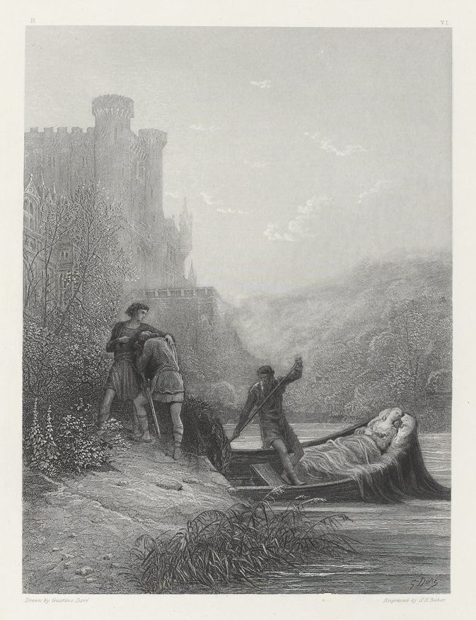 Les deux frères enlevèrent de la litière le corps de leur sœur, et le placèrent sur le noir tillac; elle tenait un lis à la main, et au-dessus d'elle était suspendu le fourreau brodé d'armoiries.